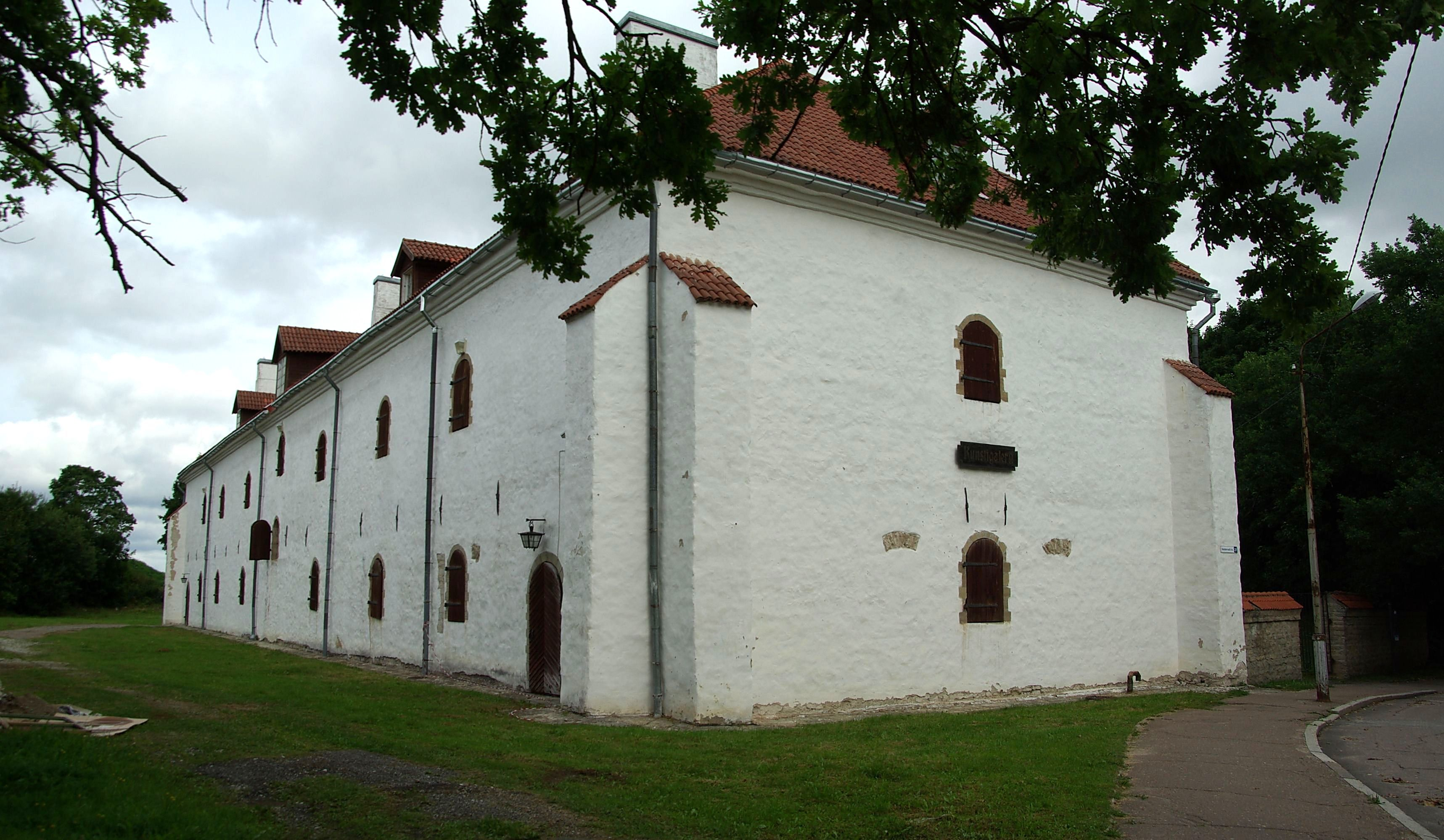 Ida-Viru maakond, Narva linn, Vestervalli tn 21